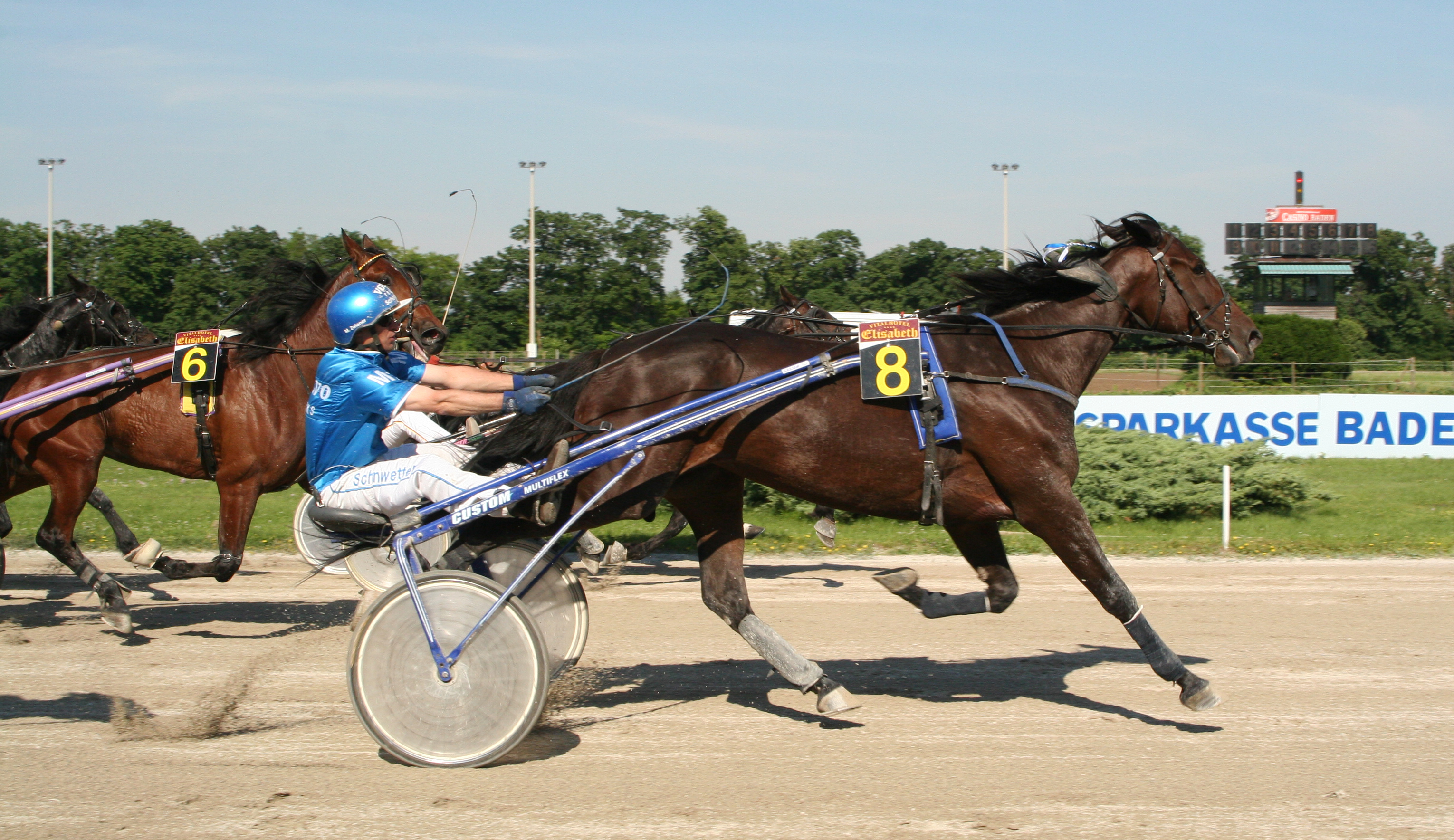 Trabrennen